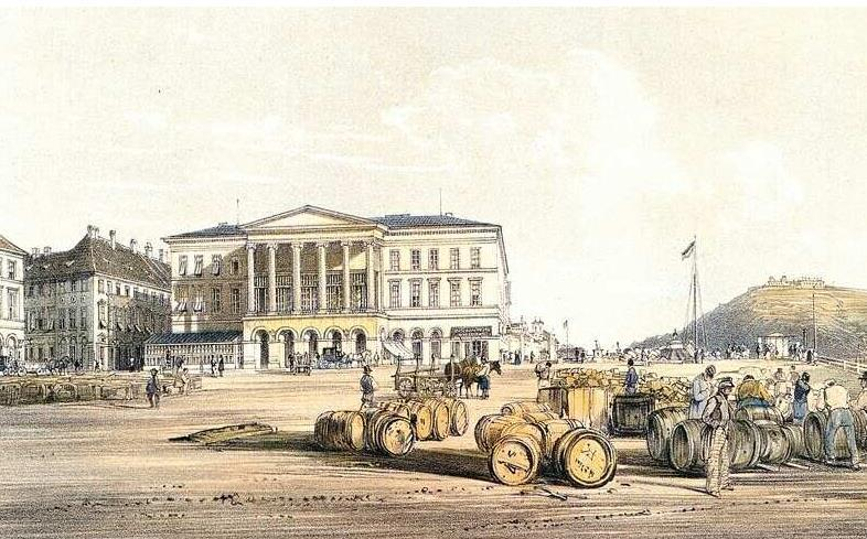 A Nemzeti Casino épülete, A Nemzeti Casinonak ez a második bérelt helye volt, alakulásakor 1827. június 10.-én a Vogel házban, a Dorottya u. 5 sz. alatt gyűltek össze a tagjai. 1859-ben először bérbe vette, majd 1871-ben tulajdonaként is megszerezte a Cziráky-palotát. Az épületet 1874-84 között Ybl Miklós tervei szerint építették át a Nemzeti Kaszinó számára.